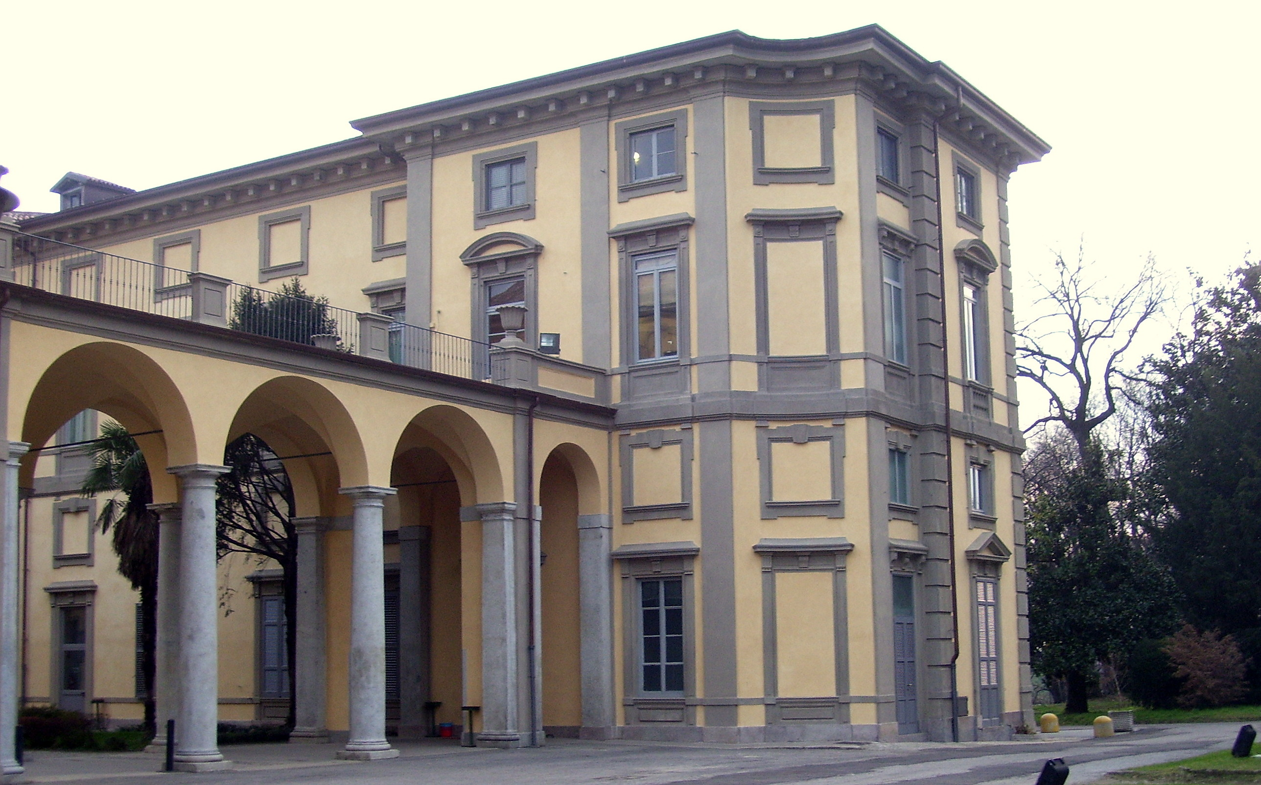 La settecentesca Villa Pusterla (Limbiate).